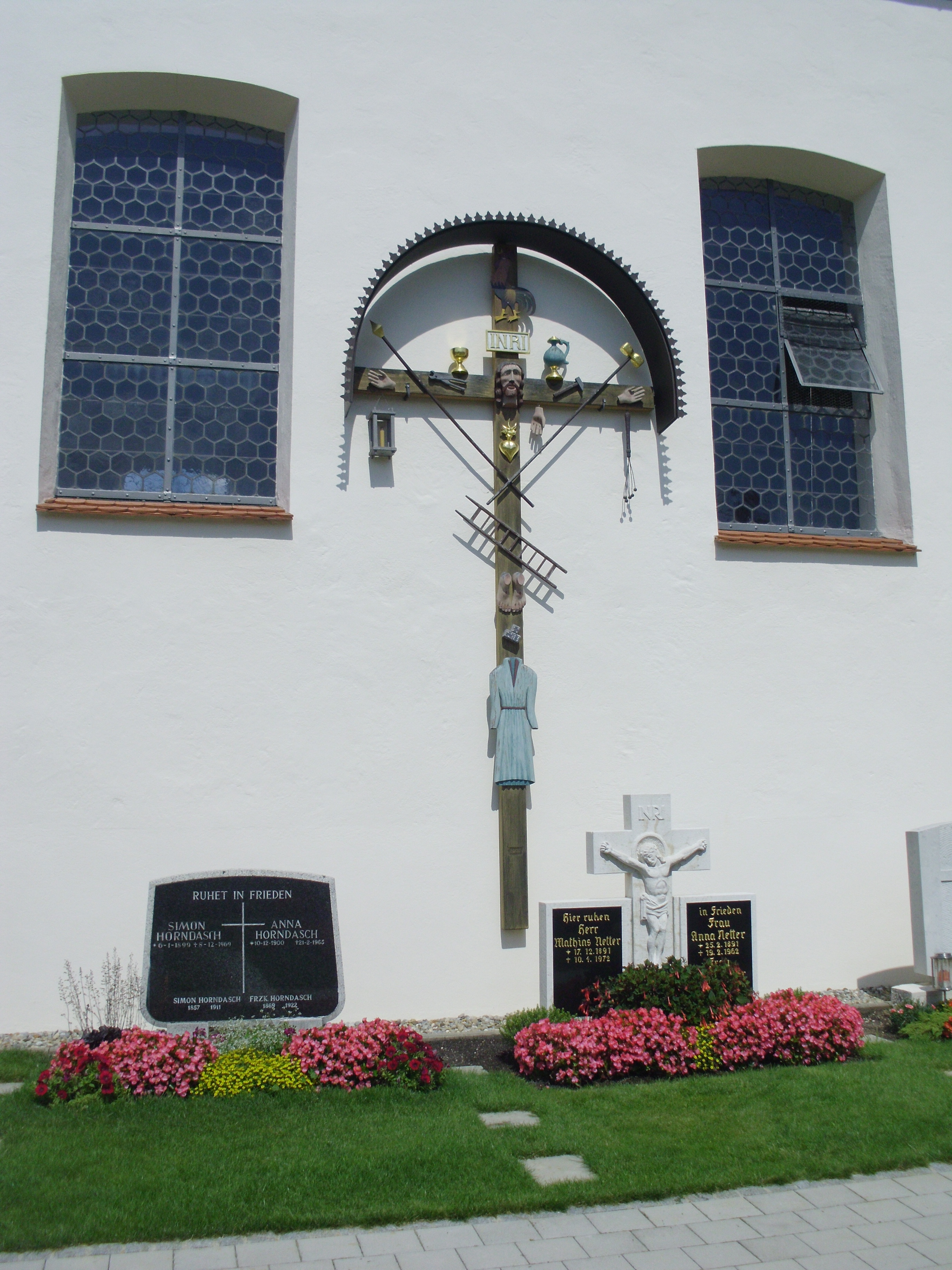 Euerwang, Ortsteil von Greding im mittelfränkischen Landkreis Roth in Bayern, Arma Christi-Kreuz an der Kirche St. Martin